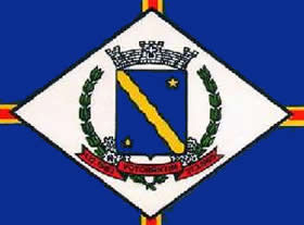 Bandeira: Votorantim - municipio do estado de São Paulo.